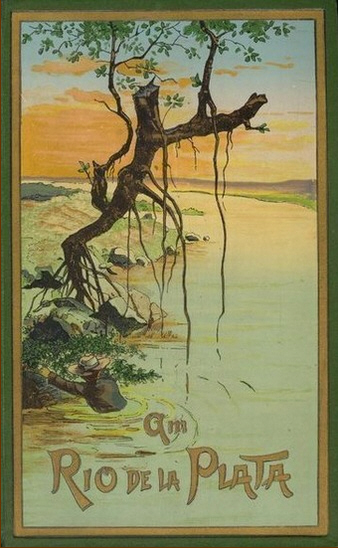 Karl May: Am Rio de la Plata